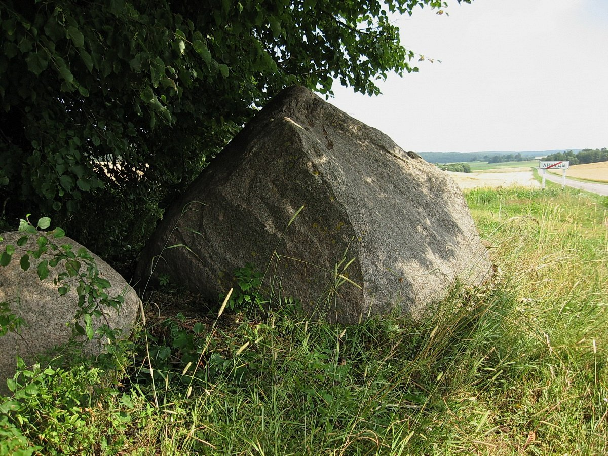 Анкудскі вялікі камень, размешчаны ў канцы вёскі Анкуды каля дарогі да станцыі Ашмяны